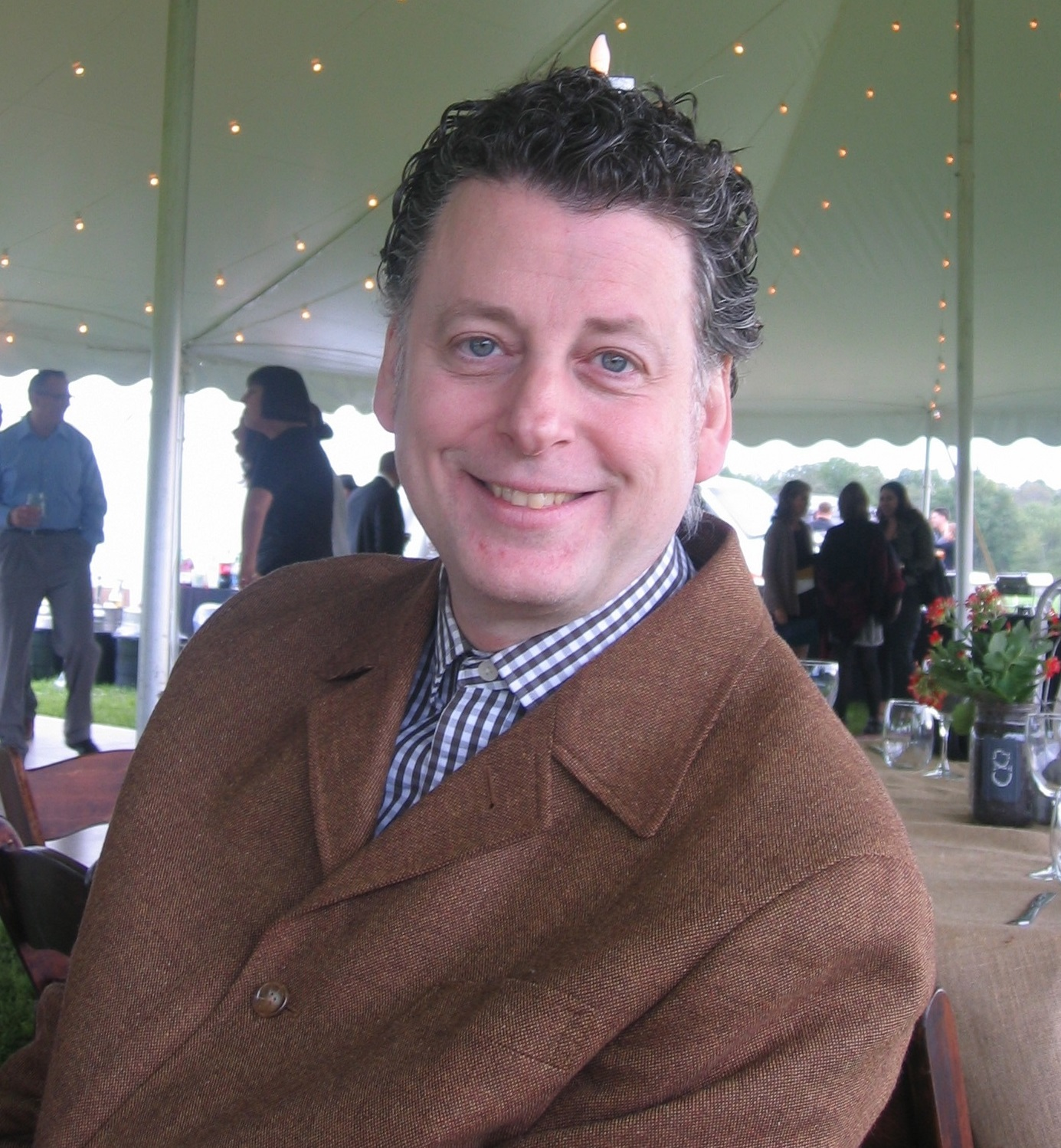 Maurice Berger en septembre 2011.